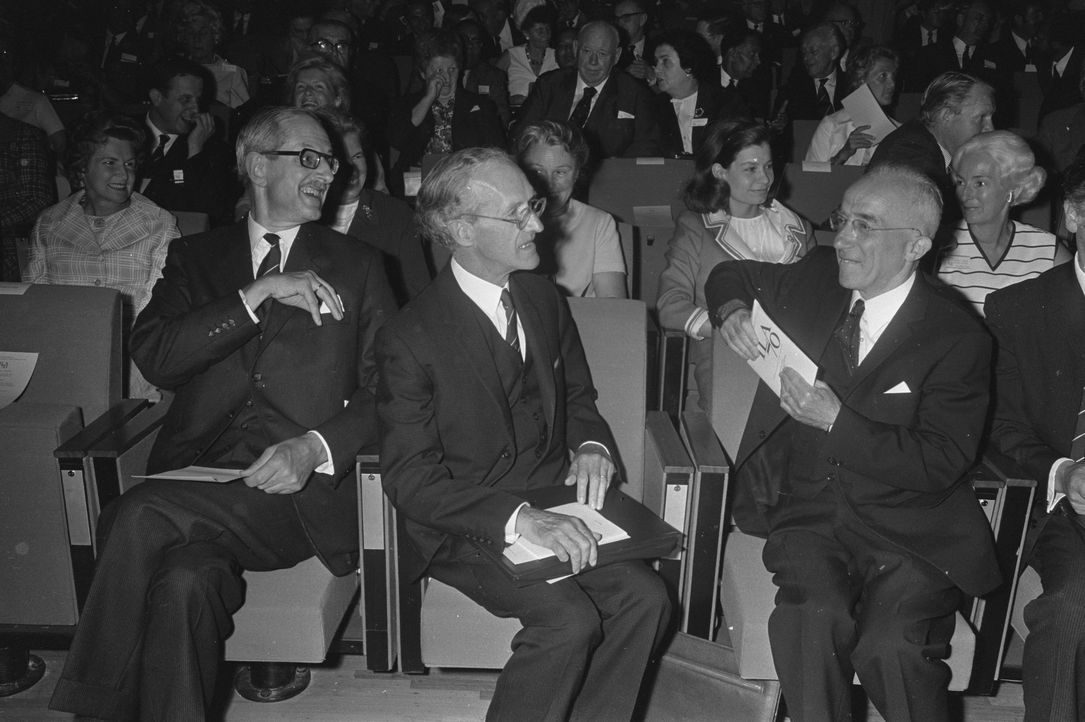 Collectie / Archief : Fotocollectie Anefo Reportage / Serie : [ onbekend ] Beschrijving : Intern. Juristen Congres in Congresgebouw, Den Haag ; prof.mr.M. Bos, hoogleraar volkenrecht Rijksuniversiteit Utrecht, Lord Wilberforce Datum : 24 augustus 1970 Locatie : Den Haag, Zuid-Holland Trefwoorden : congressen Persoonsnaam : lord wilberforce Fotograaf : Koch, Eric / Anefo Auteursrechthebbende : Nationaal Archief Materiaalsoort : Negatief (zwart/wit) Nummer archiefinventaris : bekijk toegang 2.24.01.05 Bestanddeelnummer : 923-7739